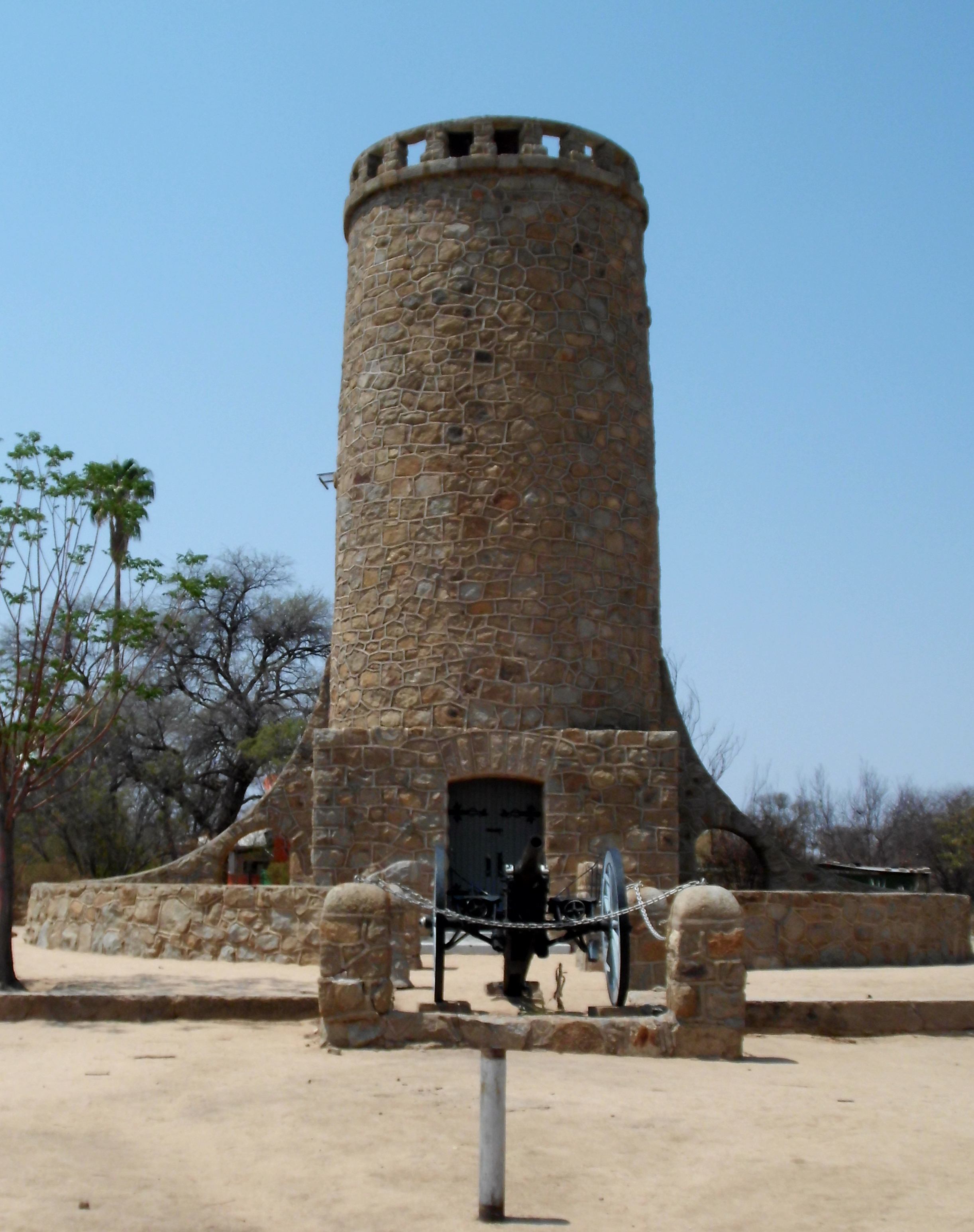 Franke-Turm in Omaruru, 1908